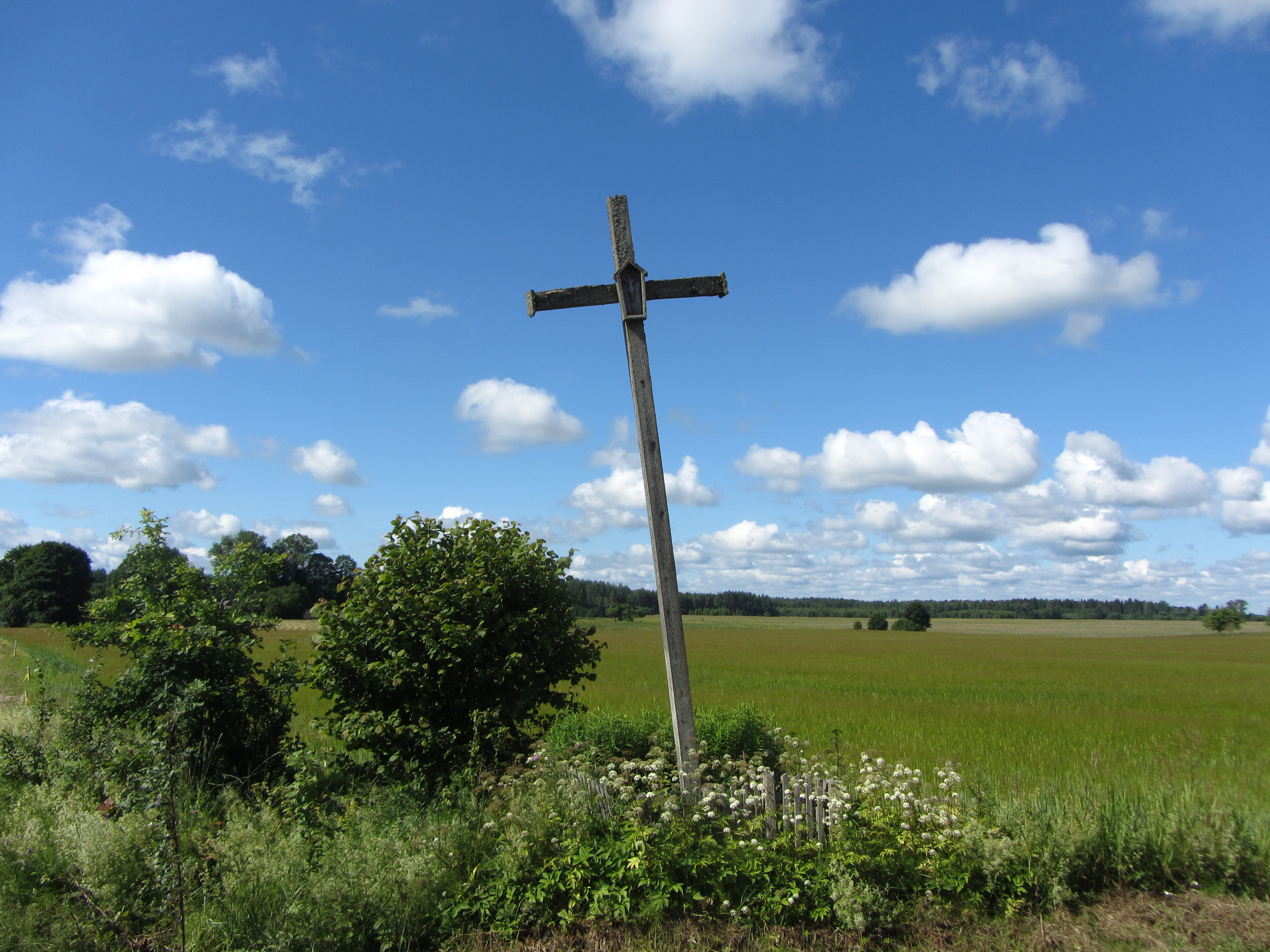 Pabradės sen., Lithuania